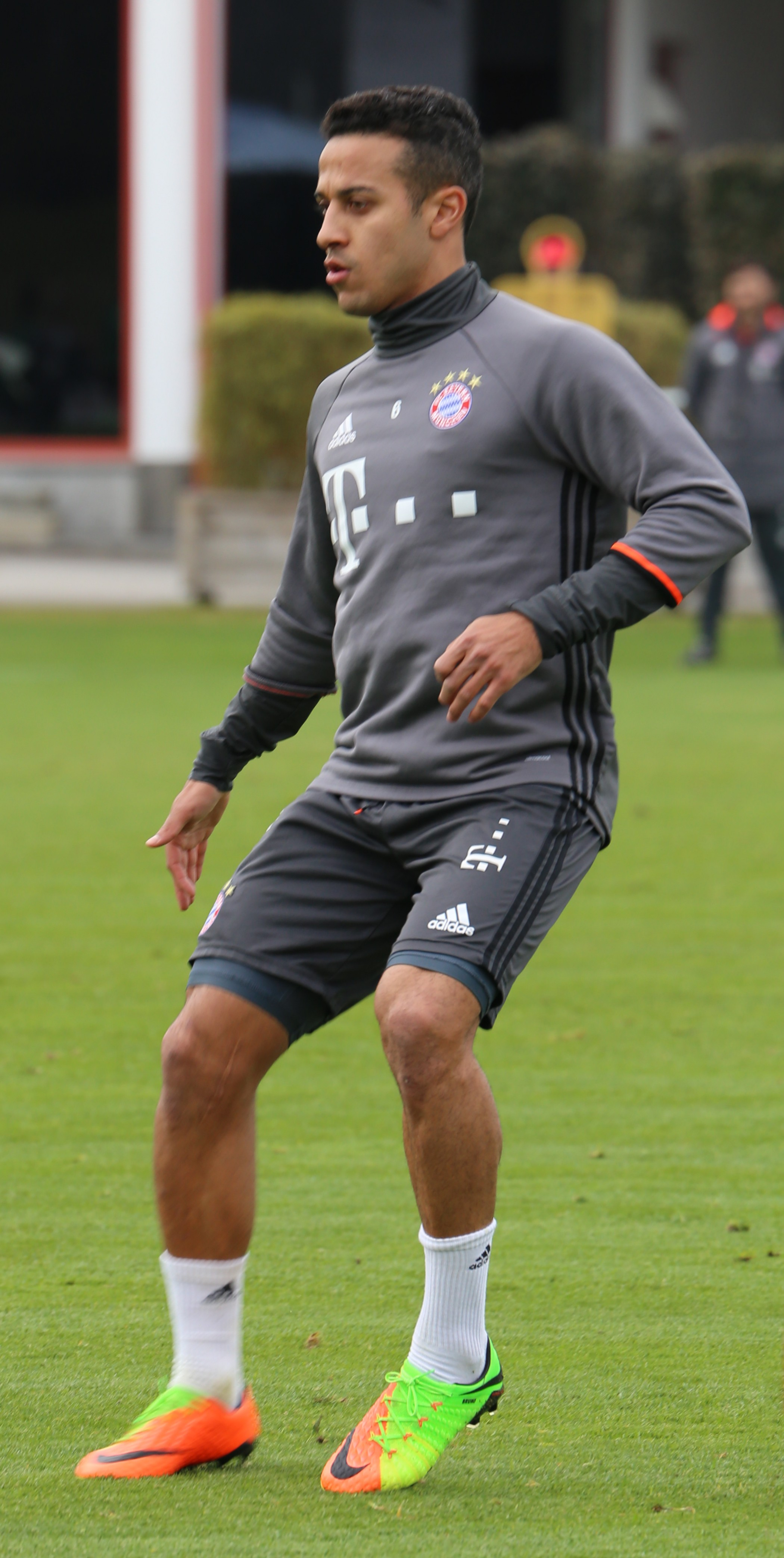 Thiago Alcántara am 14. März 2017 beim Training auf dem Gelände des FC Bayern München